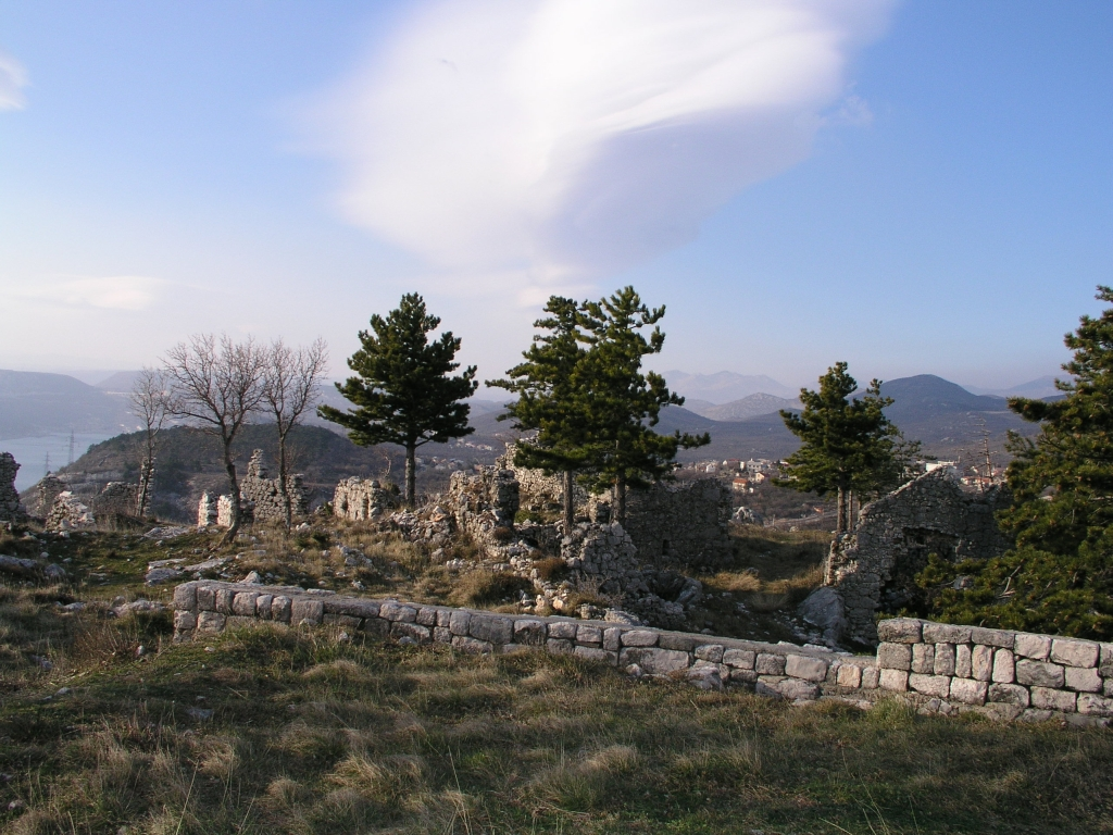 Gradina Hreljin, Hrvatska